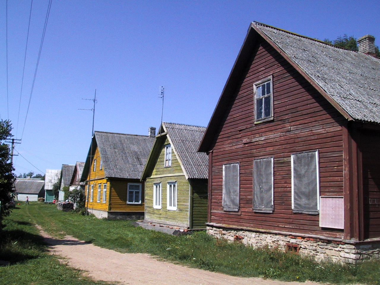 Saare village, Piiresaare island, Lake Peipsi, Estonia